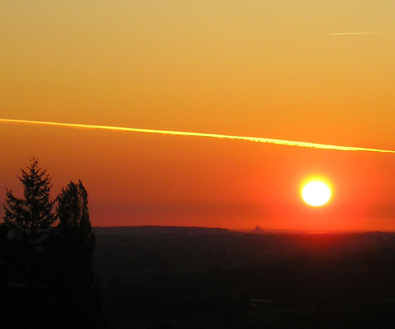 Mortain (Normandie, France). Coucher de soleil sur la baie du Mont-Saint-Michel à l'horizon, plus de 40 km.